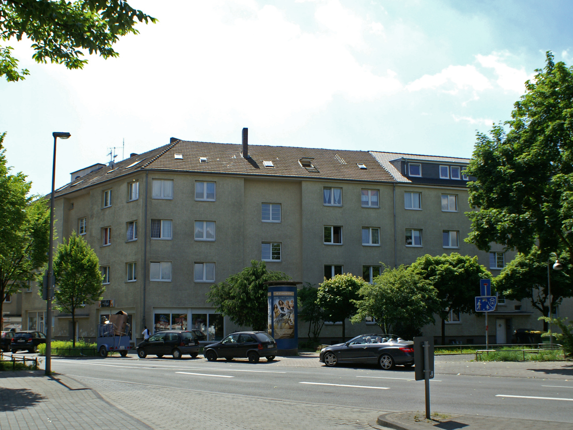 Gebäude der Schultheis-Siedlung am Bennoplatz in Köln-Höhenberg